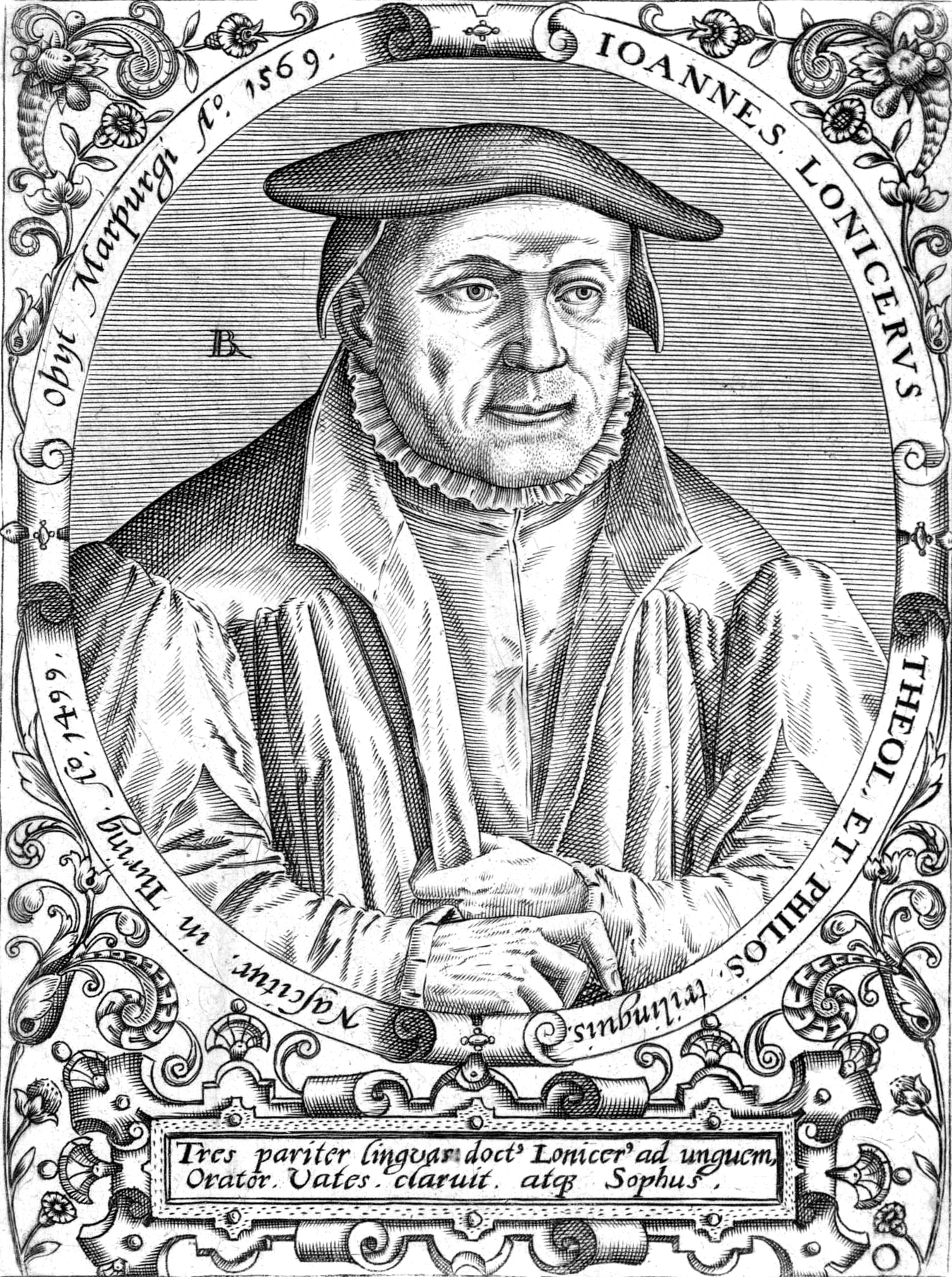 IdentificatieTitel(s): Portret van Johannes LonicerJoannes Lonicerus theol. et philos. trilinguis. (...) (titel op object)Serie portretten van vijftiende- en zestiende-eeuwse geleerden (serietitel)Objecttype: prent Objectnummer: RP-P-1917-544Catalogusreferentie: LeBlanc 113Opschriften / Merken: verzamelaarsmerk, verso, gestempeld: Lugt 2228VervaardigingVervaardiger: prentmaker: Robert Boissard (vermeld op object)Plaats vervaardiging: FrankrijkDatering: 1597 - 1599Materiaal: papier Techniek: graveren (drukprocedé)Afmetingen: plaatrand: h 145 mm (Onduidelijke plaatrand.) × b 109 mm (Onduidelijke plaatrand.)ToelichtingMogelijk prent uit: Boissard, Jean-Jacques; Bry, Theodoor de; e.a. Bibliotheca sive thesaurus virtutis et gloriae in quo continentur illustrium eruditione et doctrina virorum effigies et vitae (...). Frankfurt: Guilielmi Fitzeri, 1628.OnderwerpWat: historical personsarmorial bearing, heraldryWie: Johannes LonicerVerwerving en rechtenVerwerving: aankoop 1905Copyright: Publiek domein